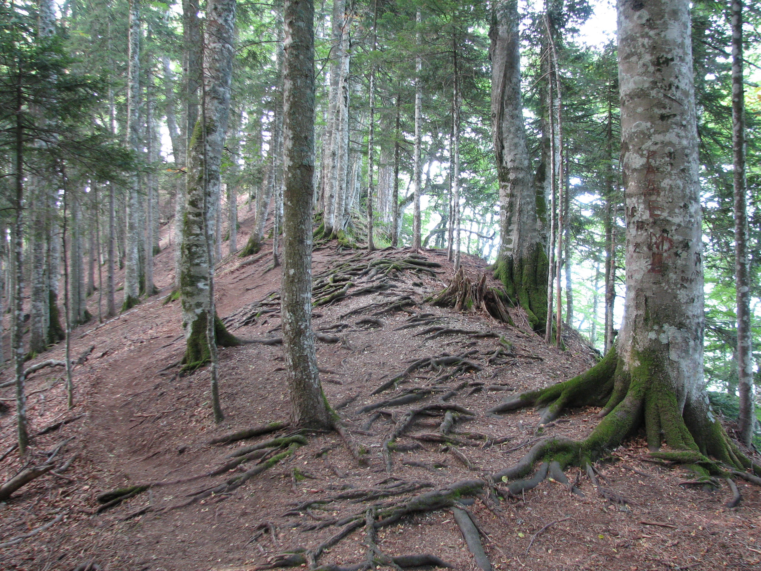 Perućica Forest